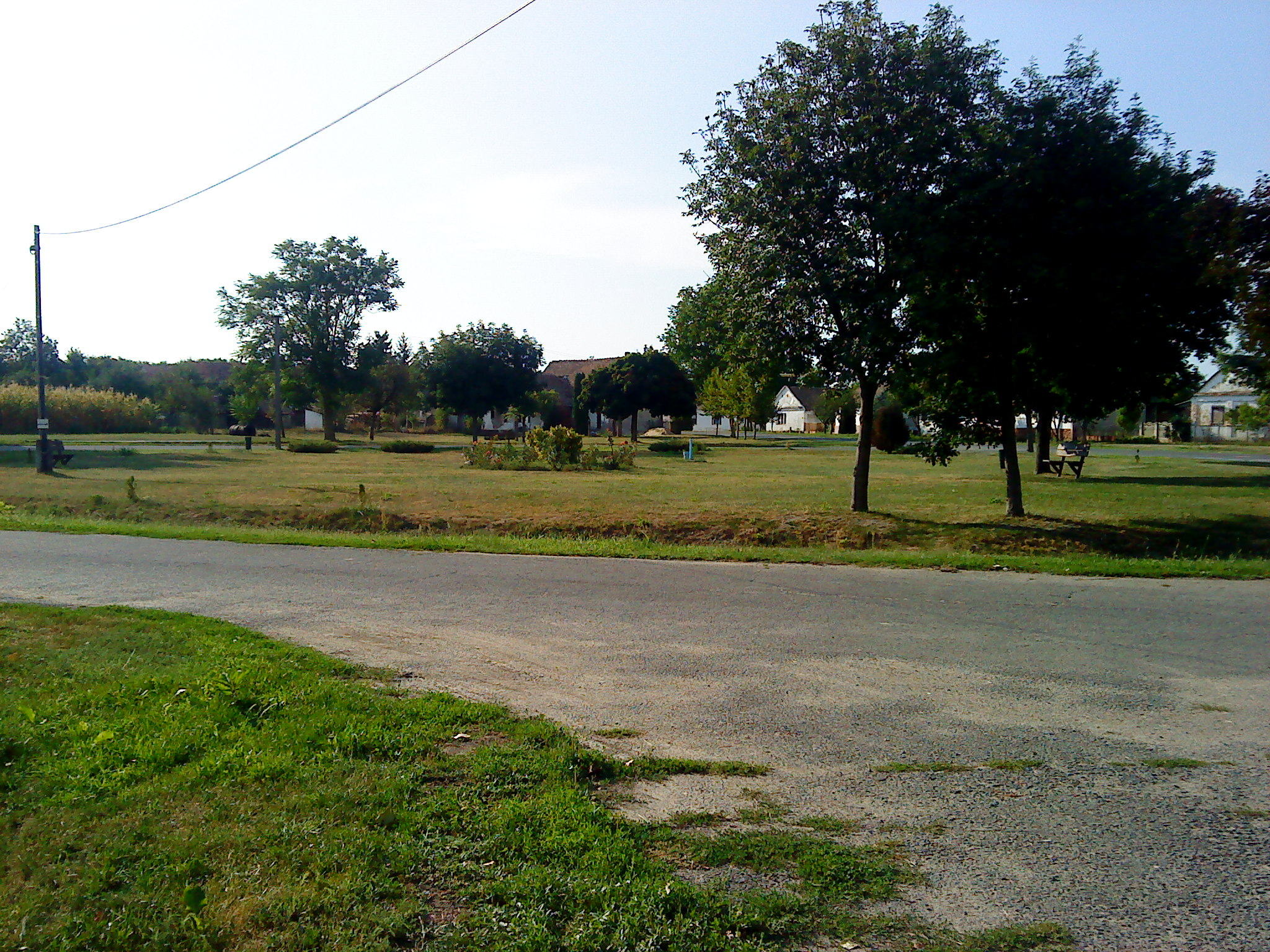 főtér